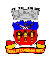 Brasão da cidade de São Francisco do Conde